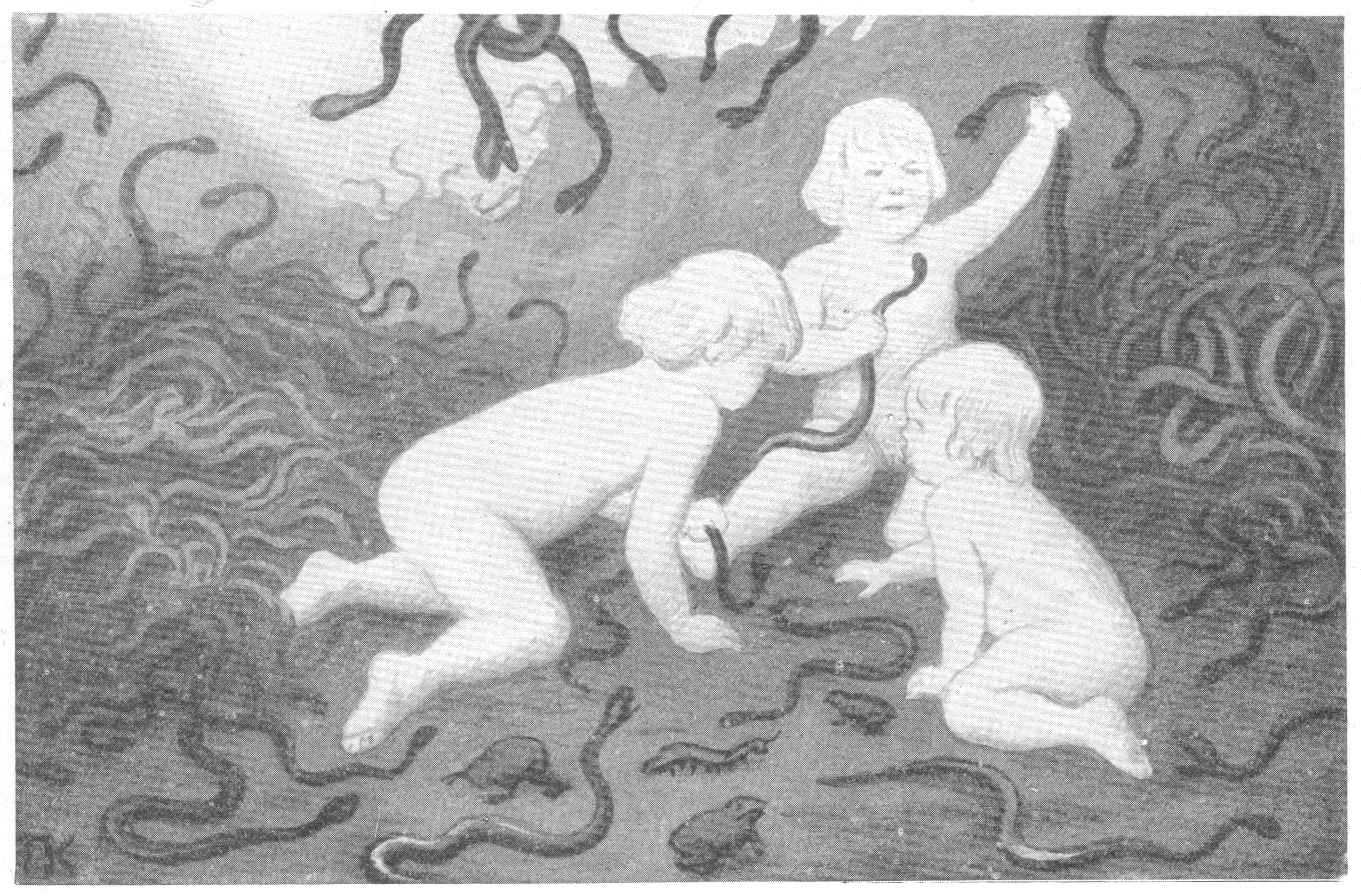 Illustrasjon til folkeeventyret De tolv villender «Der lå de tre barna og lekte sig med ormer og padder» Scanned illustration from 1936 edition of Asbjørnsen & Moe: Samlede eventyr. Norske kunstneres billedutgave. Gyldendal Norsk forlag.